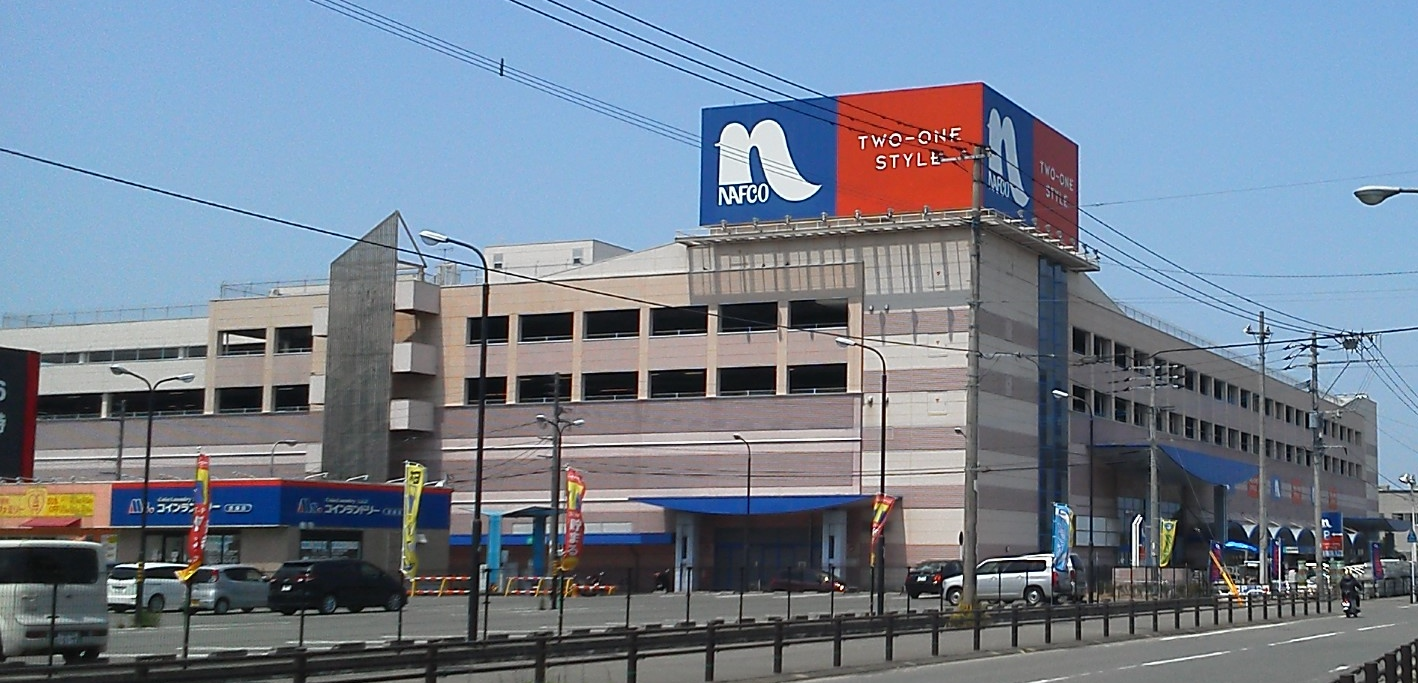 ナフコの福岡空港店（福岡市博多区大井）。